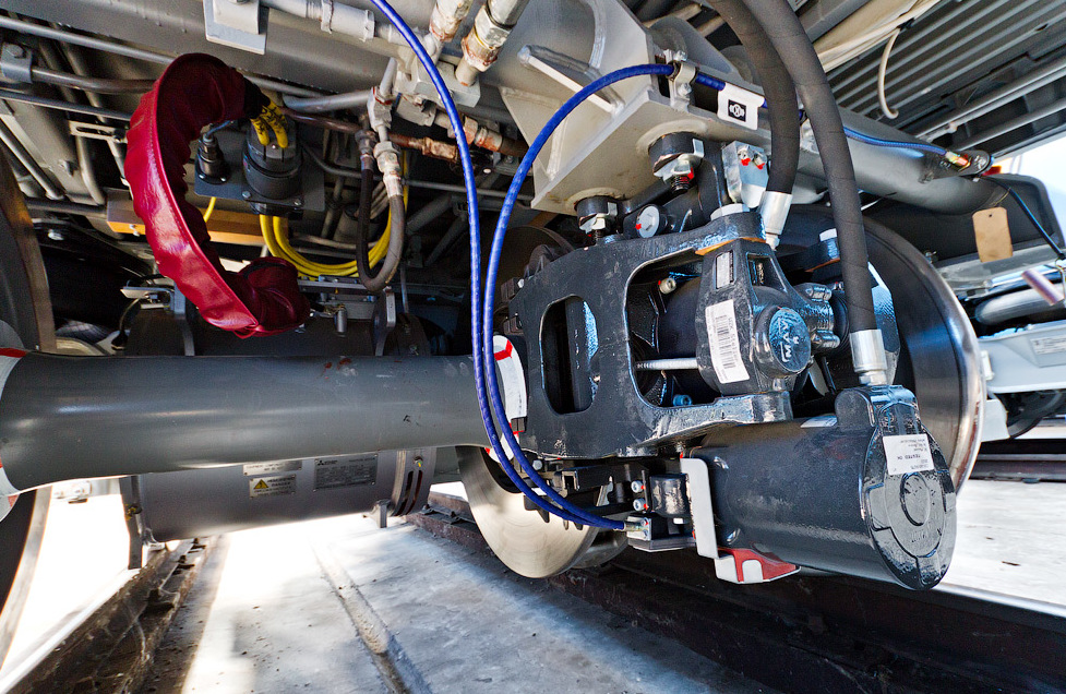 Колесная пара вагона метро типа Е-КМ-Гб в депо Дарница.